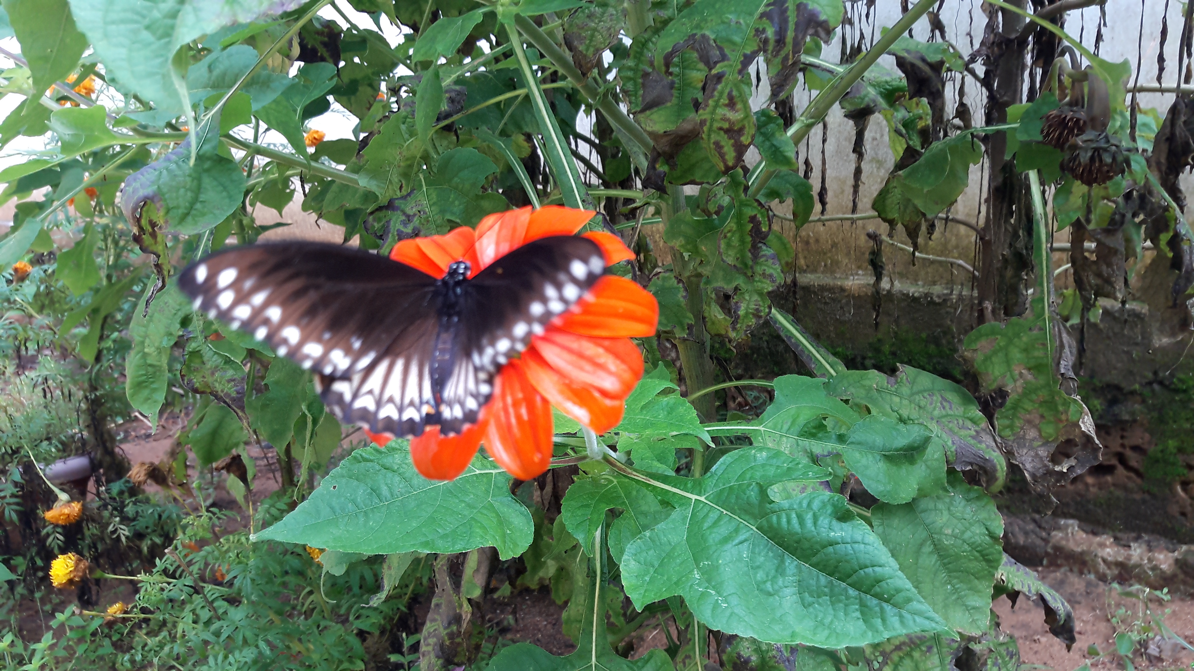 Mexican sun flower ചെടിയിൽ തേൻ നുകരുന്ന ചിത്രശലഭം. ശാസ്ത്രീയ നാമം Tithonia diversifolia കുടുംബം Asteraceae.